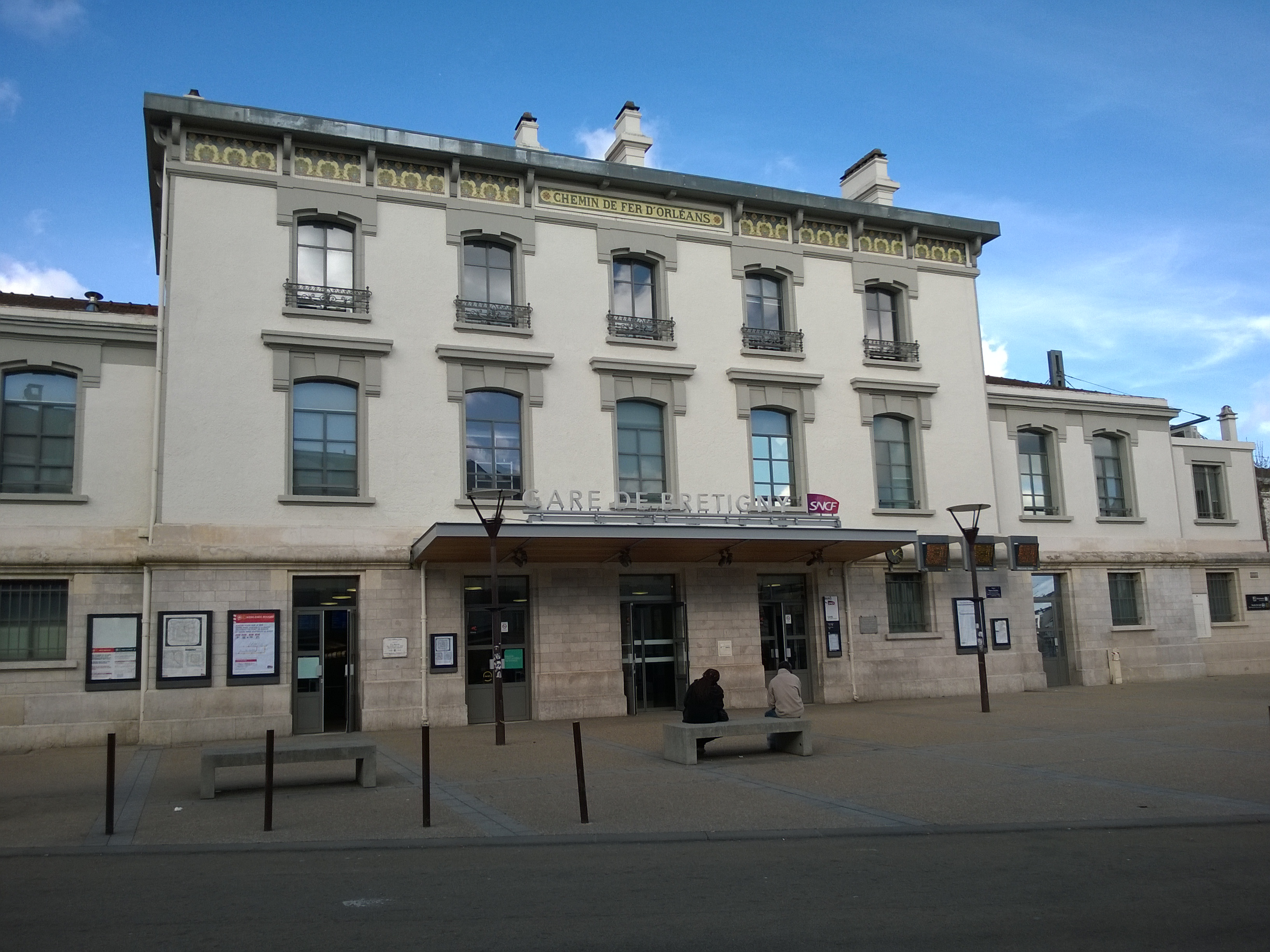 L'accès principal de la gare de Brétigny, département de l'Essonne, France.